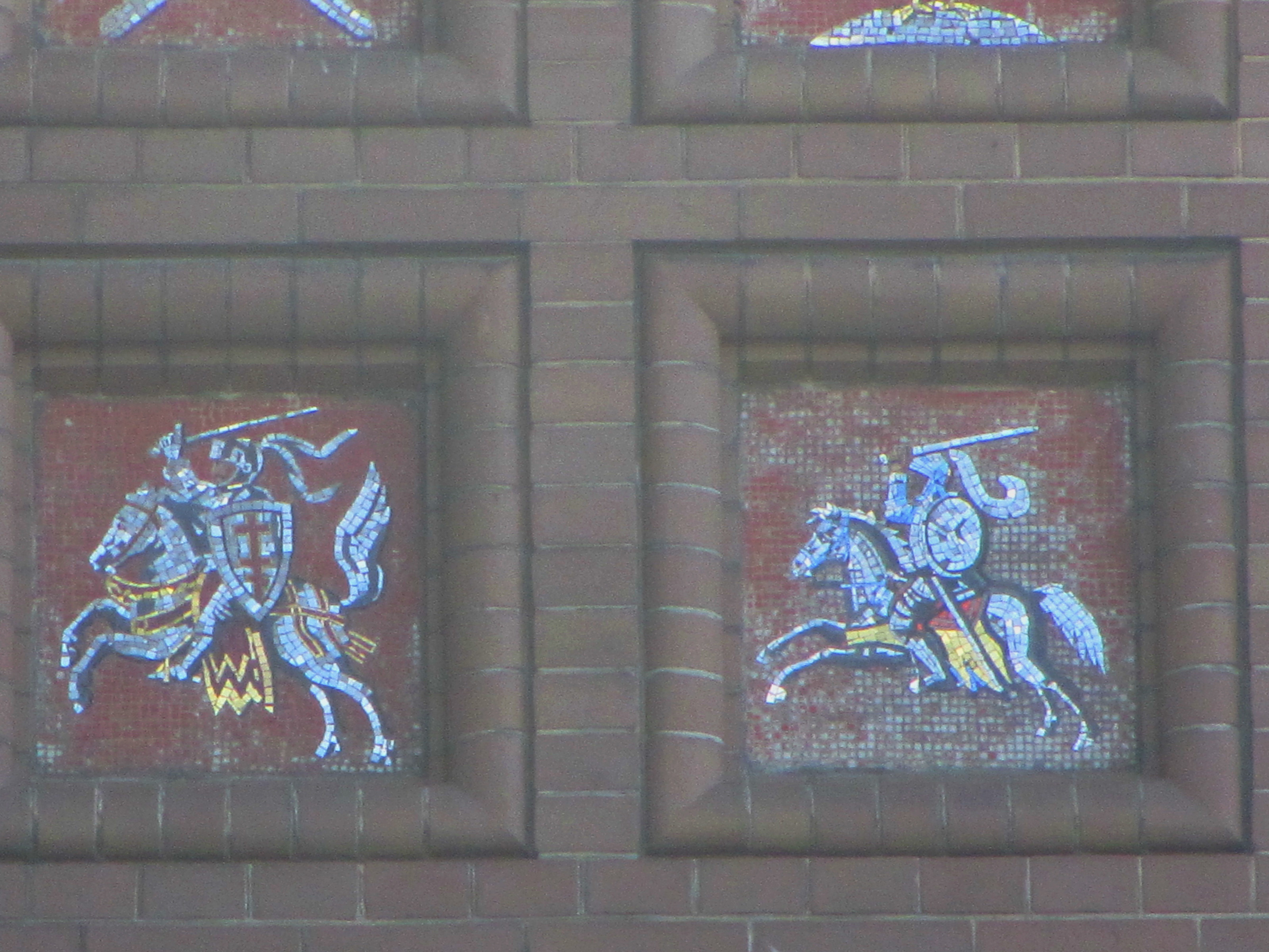 Беларуская (тарашкевіца): Герб Пагоня на фасадзе храма Спас на Крыві, Санкт-Пецярбург